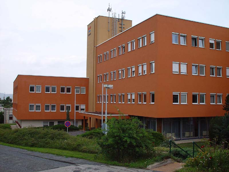 Budova Českého hydrometeorologického ústavu v Praze